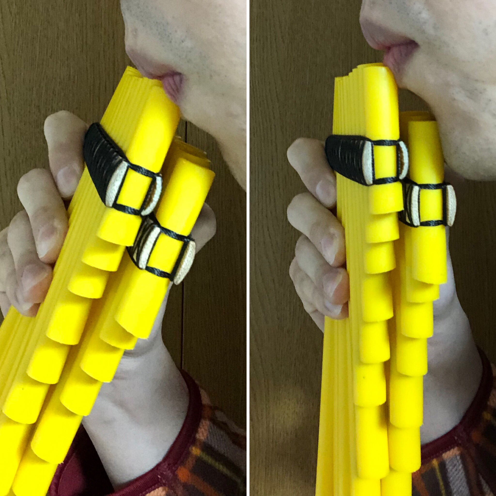 低音奏法と高音奏法